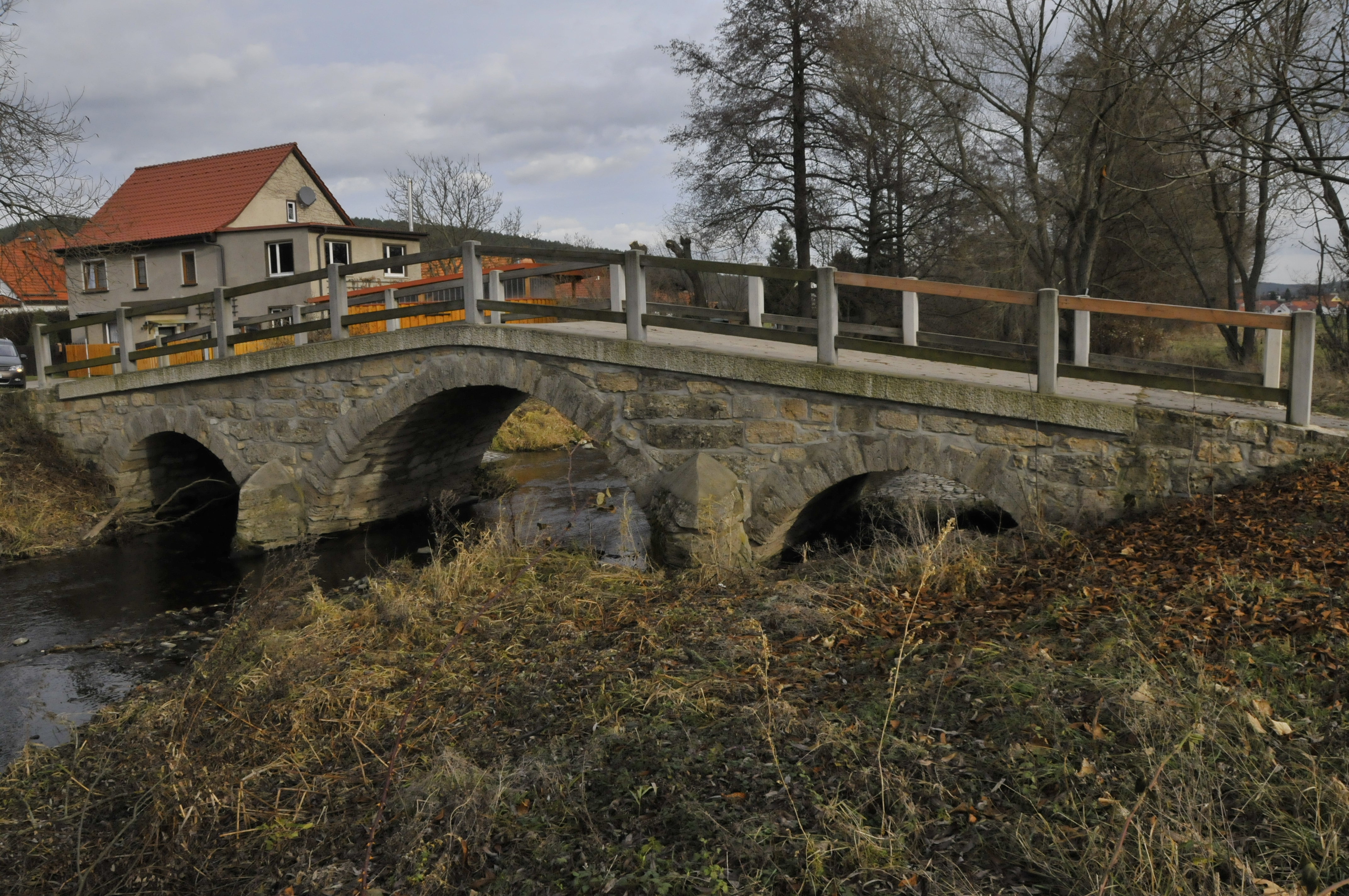 Ilmbrücke in Großhettstedt